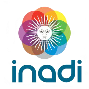 Logo INADI cuadrado